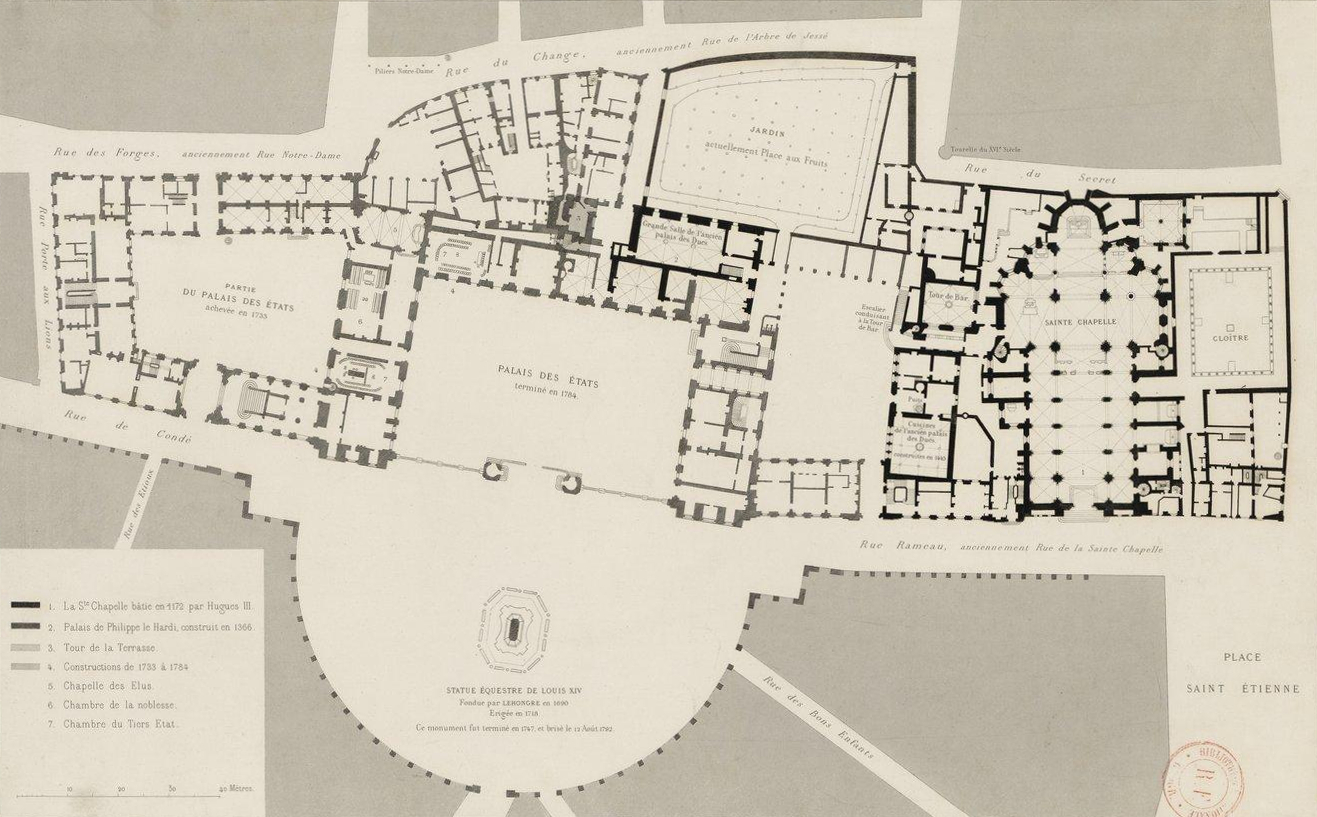 Plan du palais des ducs de Bourgogne (1850), à Dijon . D'après le dessin conservé aux Archives de la ville / Des. par A. Sirodot, Arch. Ingénieur. [1 : 535 environ] ; Gravé par A.F. Lemaître